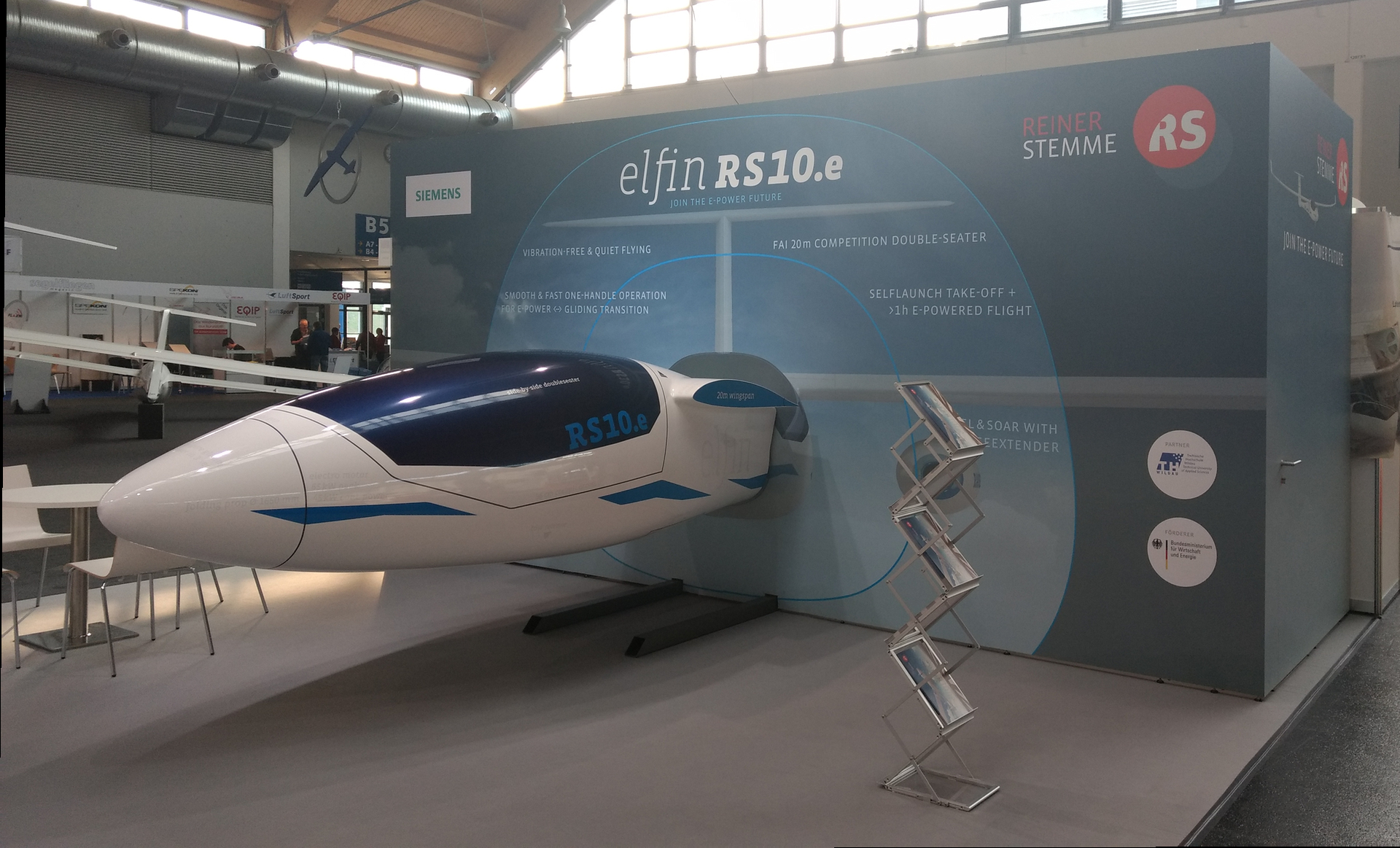 Mock-up des Elektromotorseglers RS10.e elfin auf der Luftfahrtmesse AERO